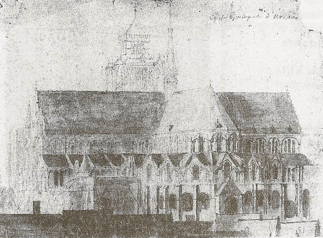 Dessin du XVIIIe siècle du chevet de l'ancienne cathédrale Notre-Dame-en-Cité d'Arras, aujourd'hui disparue.